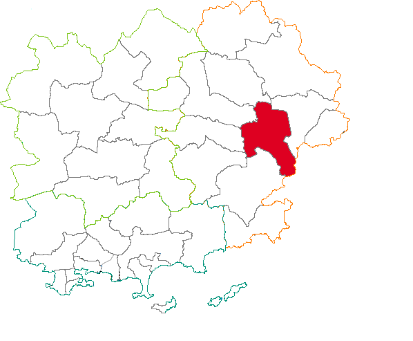 Situation du canton dans le département du Var (83), France